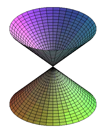 Cône : surface réglée Licensing Source : image créée par l'auteur (Theon)